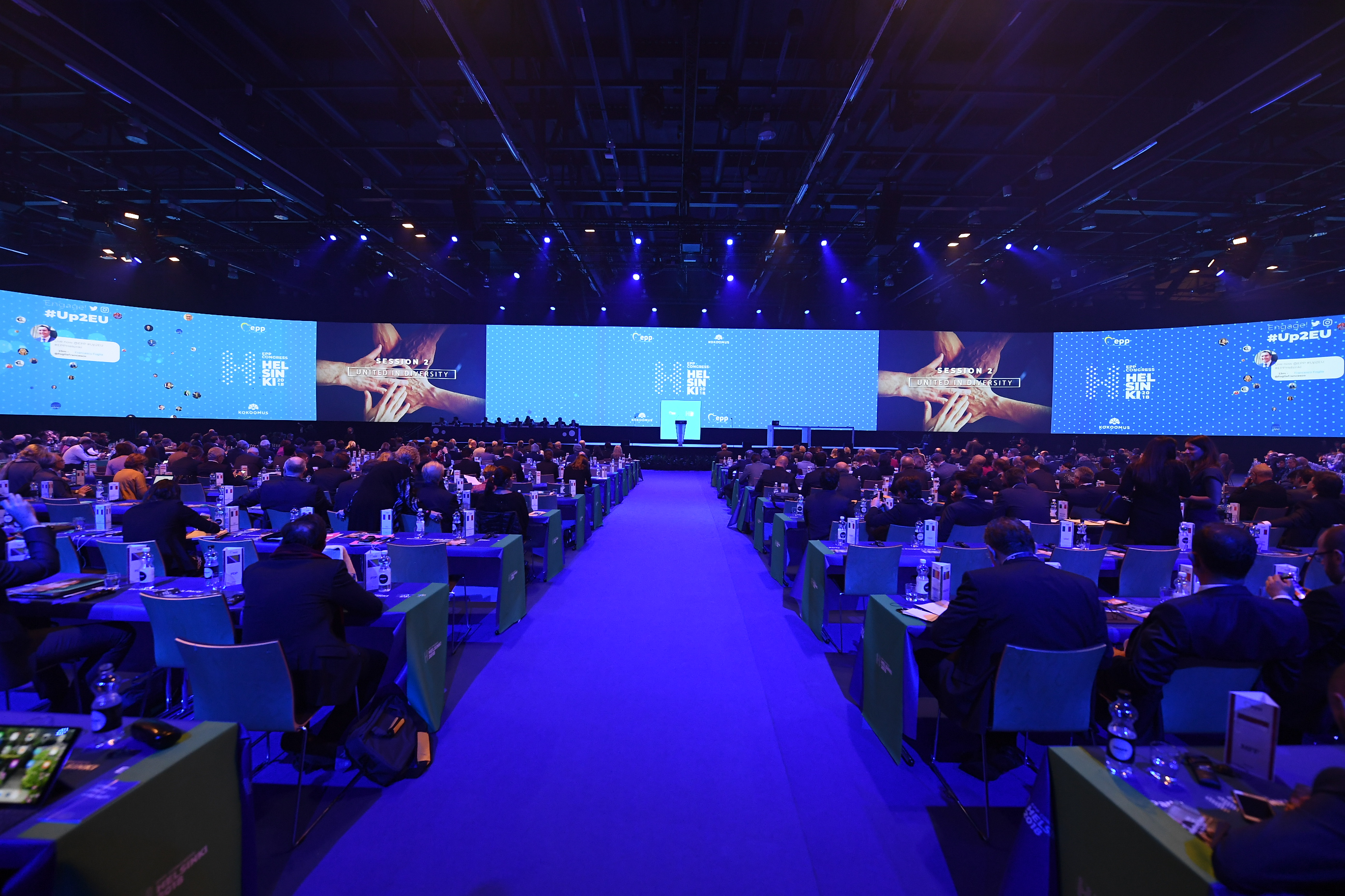 7 November 2018